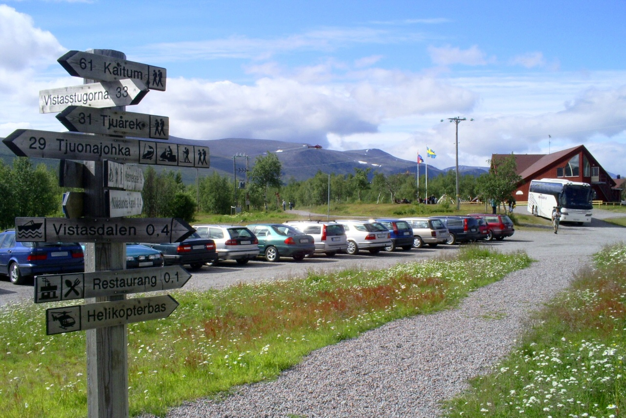 Nikkaluokta parking space and hotel